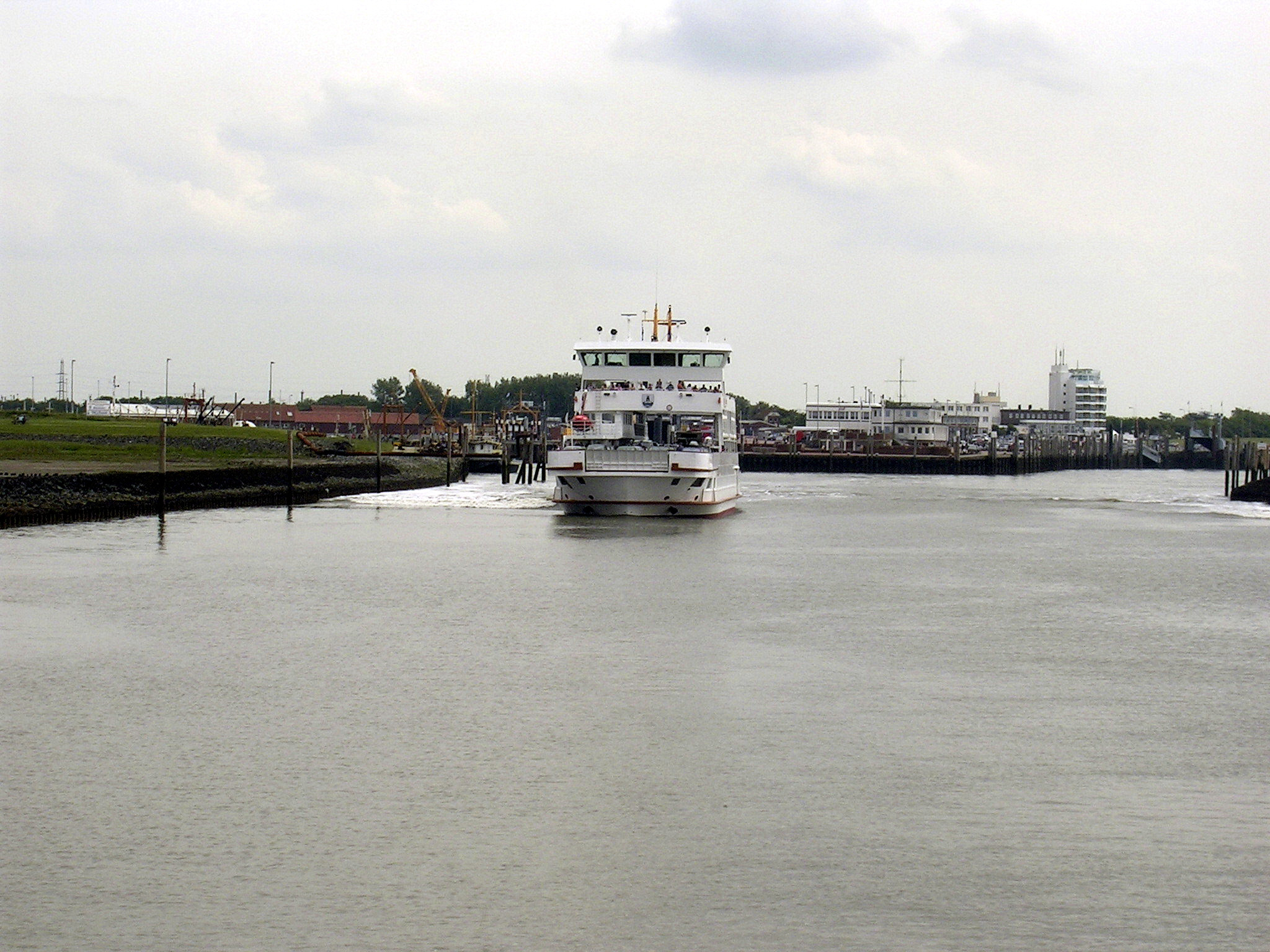 Anleger der AG Reederei Norden Frisia und Frisia I in der Mole von Norddeich